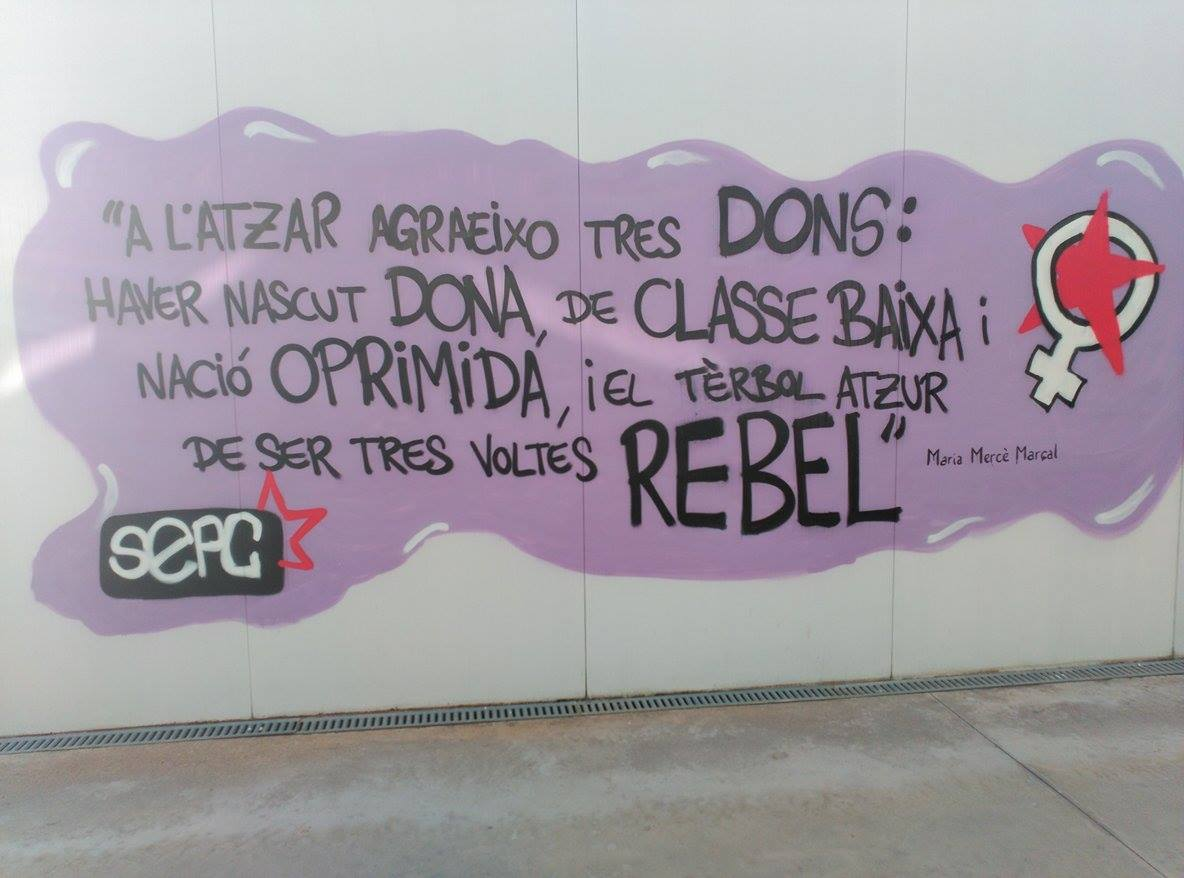 Mural del Sindicat d'Estudiants dels Països Catalans, de l'any 2013 al campus de Montilivi de la Universitat de Girona, reproduint l'aforisme reivindicatiu de la poetessa Maria Mercè Marçal sobre la seva triple condició de dona, de classe baixa i de nació oprimida.